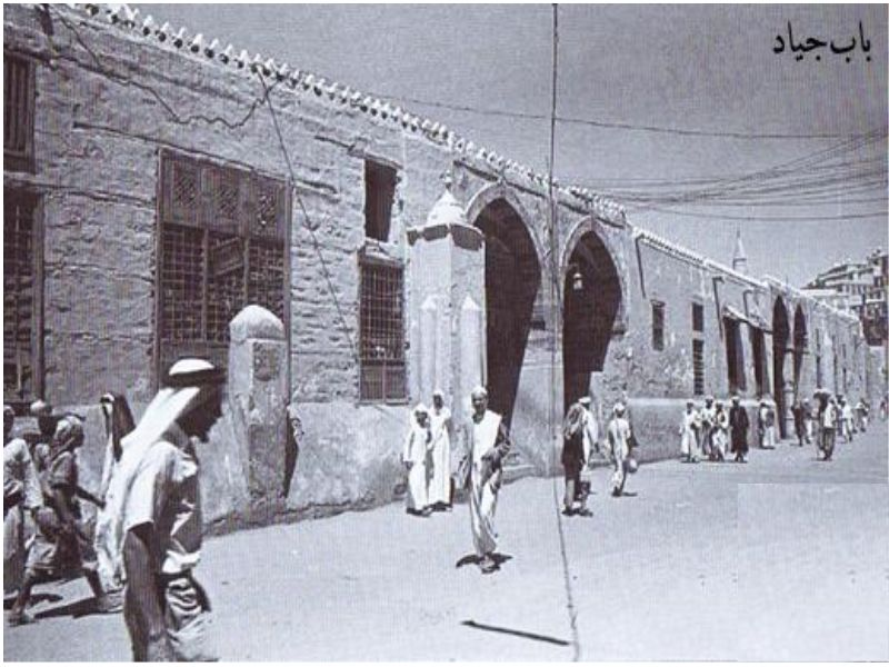 باب أجياد أحد أبواب المسجد الحرام قديماً